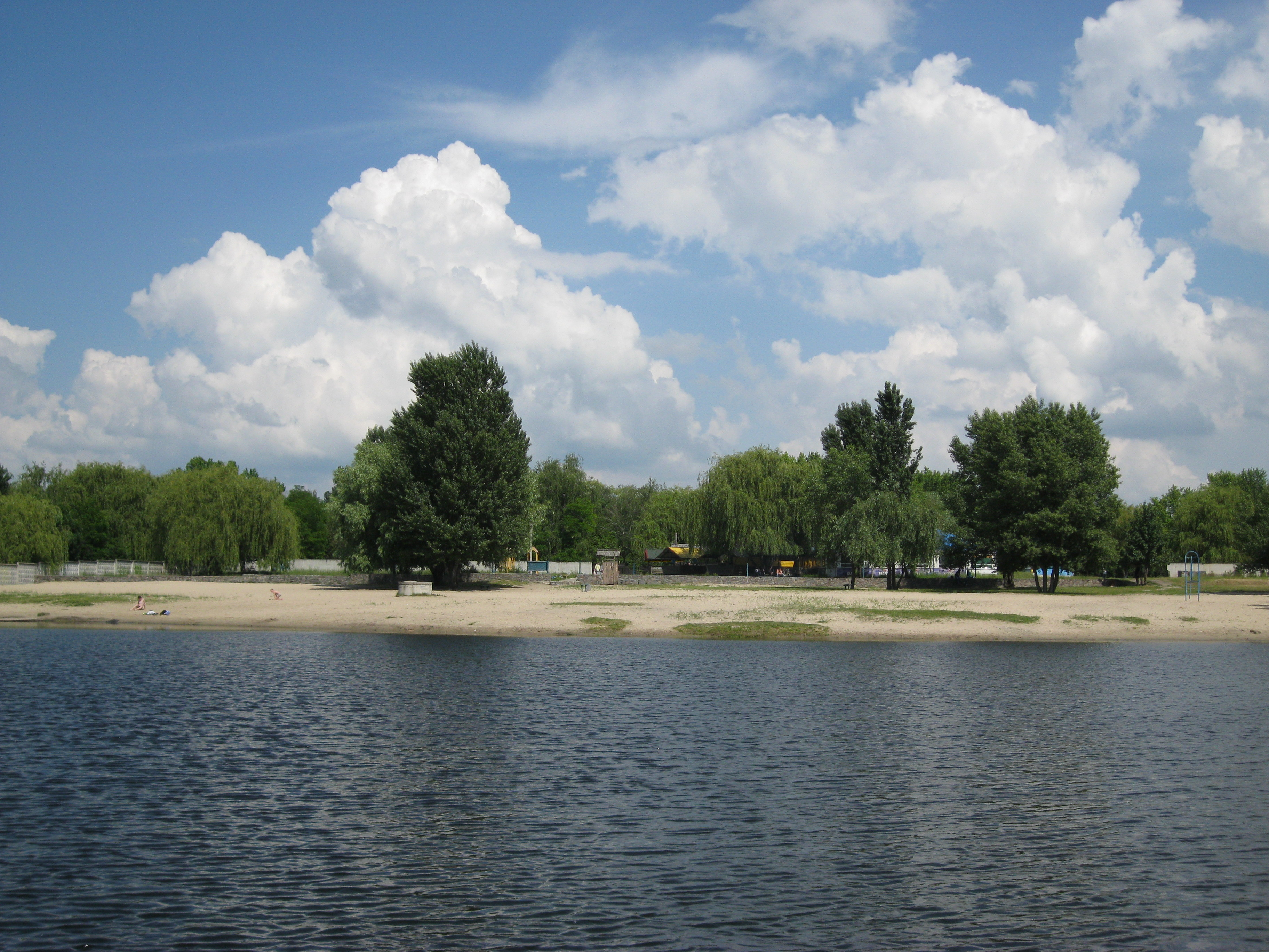 Регіональний ландшафтний парк «Кагамлицький». Вид з правого берегу річки Сухий Кагамлик на пляж у парку Воїнів-Інтернаціоналістів